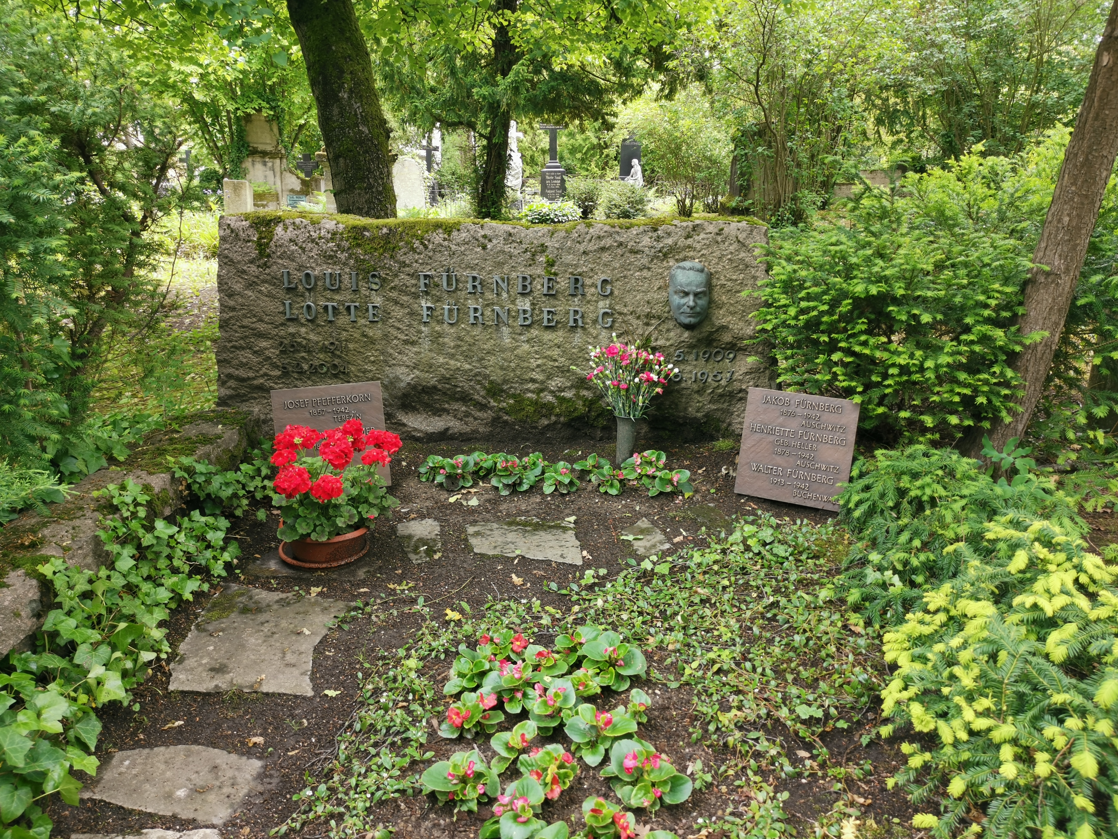 Grab Louis Fürnberg; Historischer Friedhof Weimar